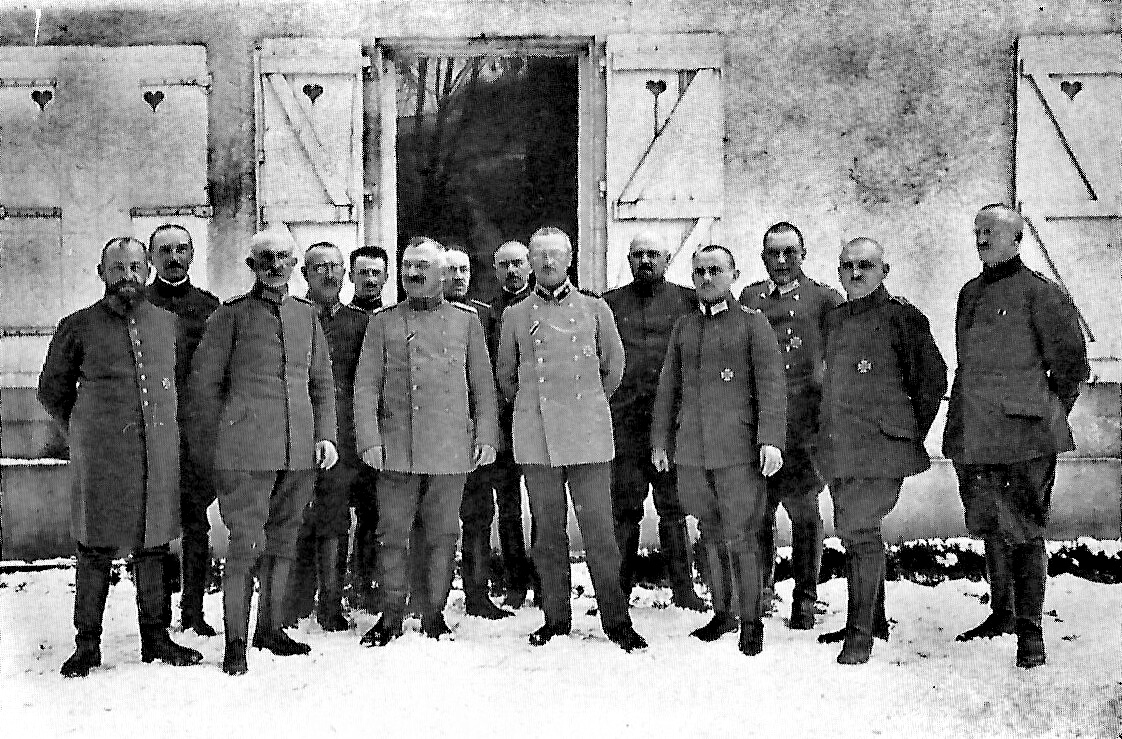 Stab 13. I. D. im Frühjahr 1918. In der Mitte: Generalmajor v. Bories